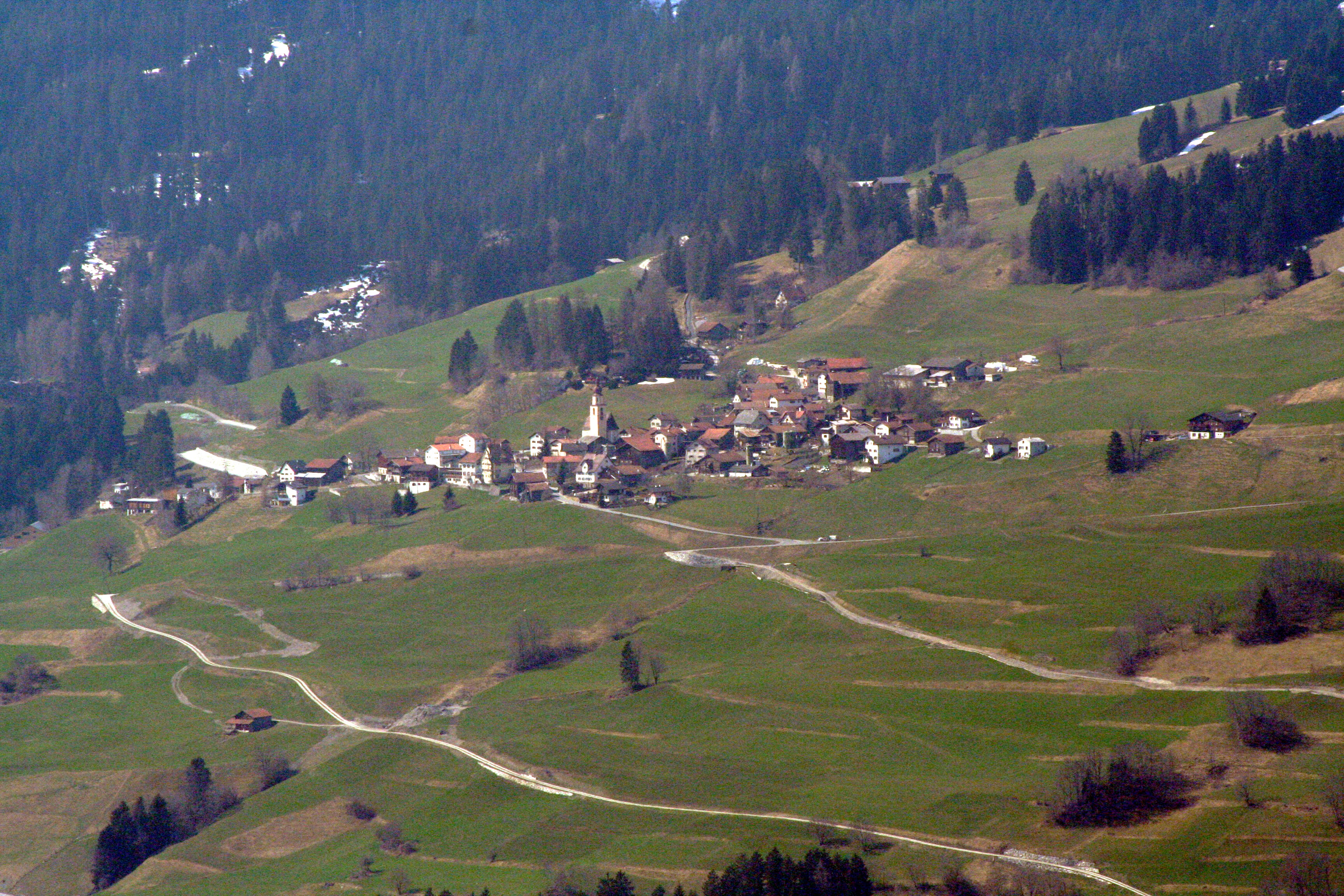 Sarn